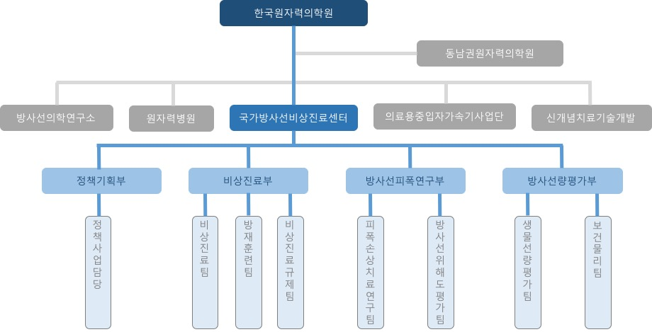 국가방사선비상진료센터 조직 및 부서소개